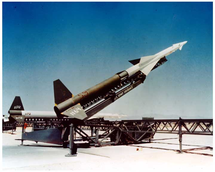 MIM-3 Nike-Ajax